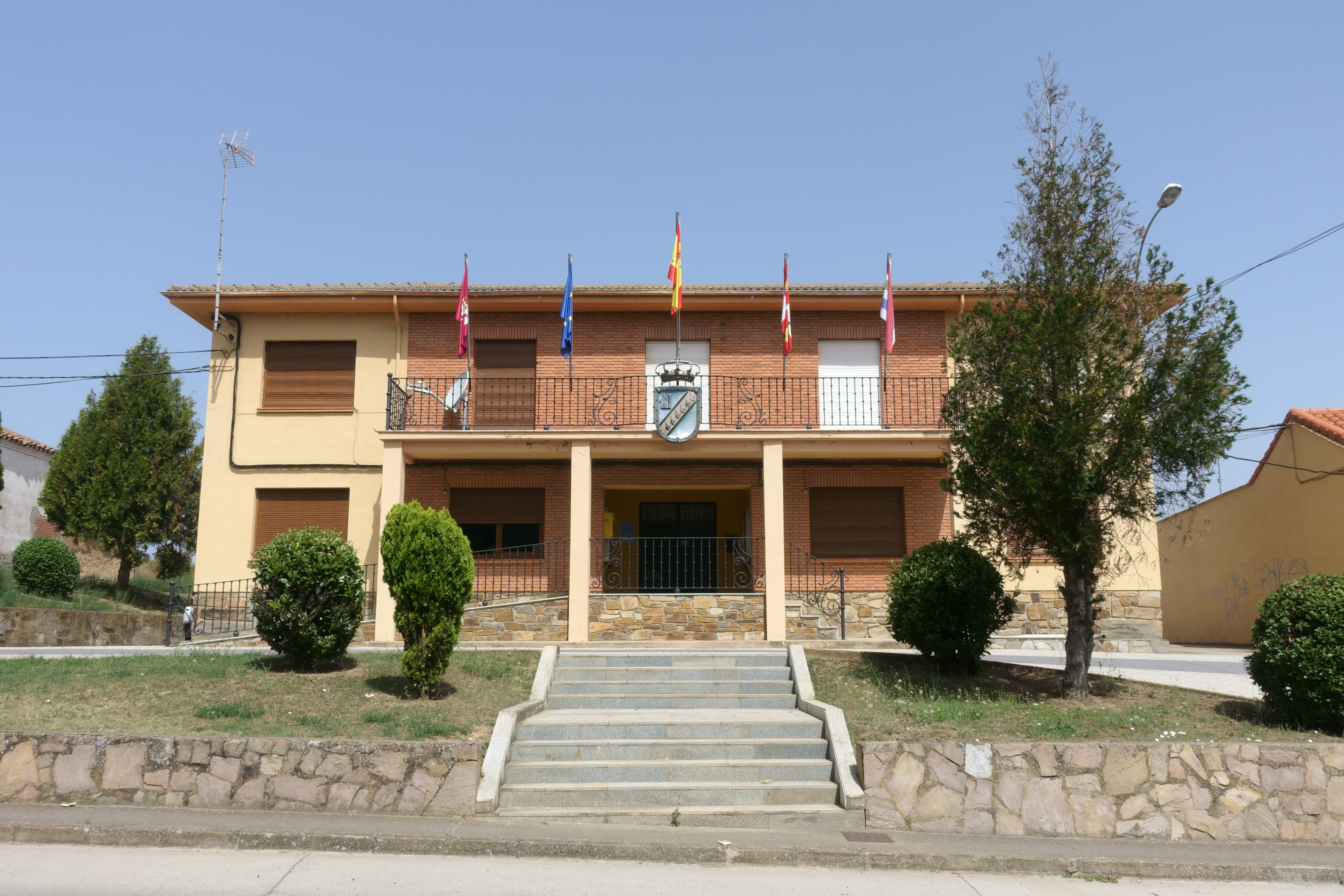 Casa consistorial de Riego de la Vega (León, España).